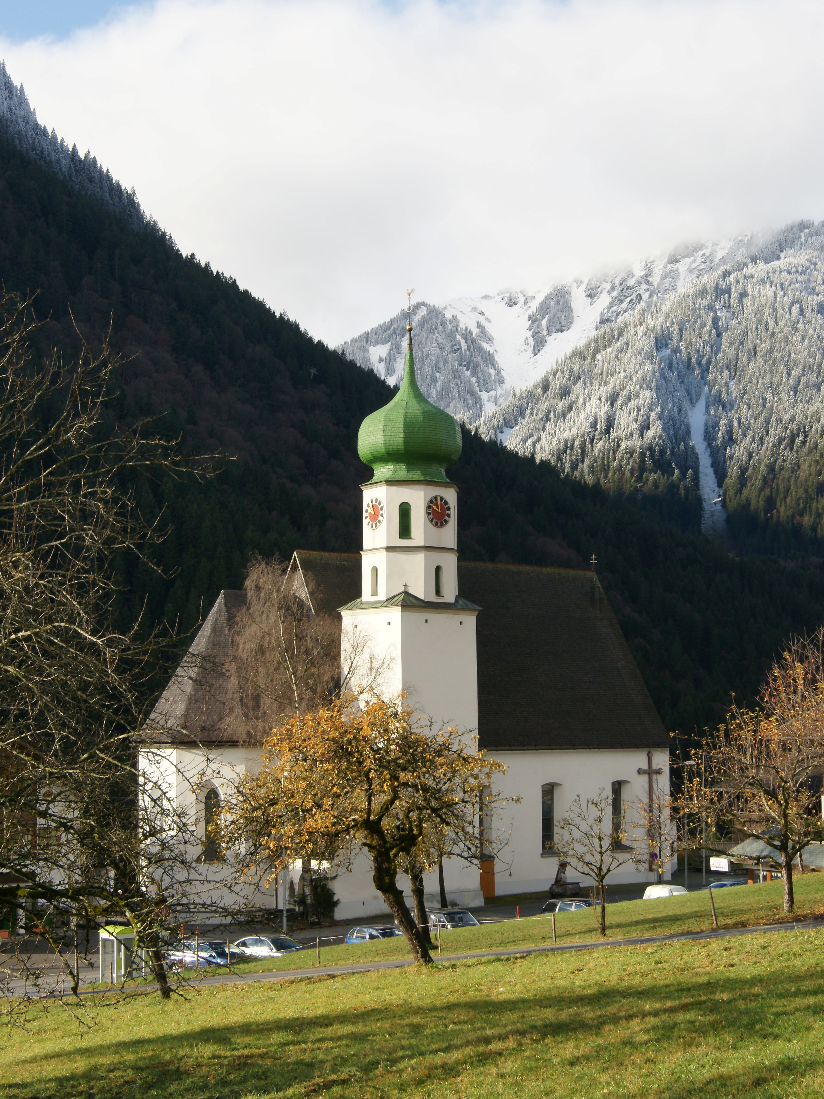 Pfarrkirche hl. Gallus in Sankt Gallenkirch im Montafon.